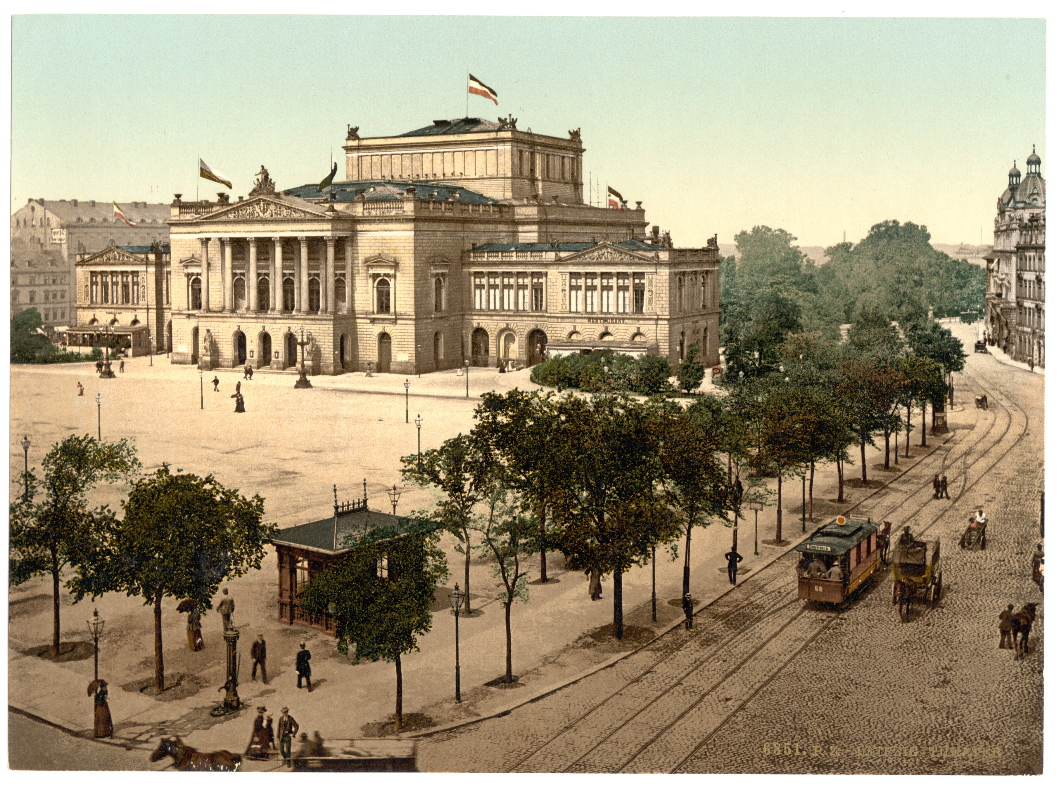 Leipzig